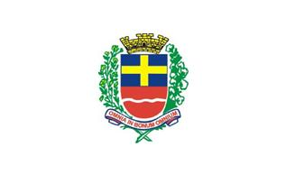 Bandeira da cidade paulista de Santa Cruz do Rio Pardo